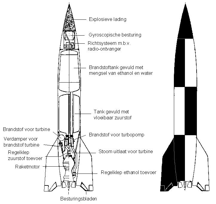 V-2 raket.